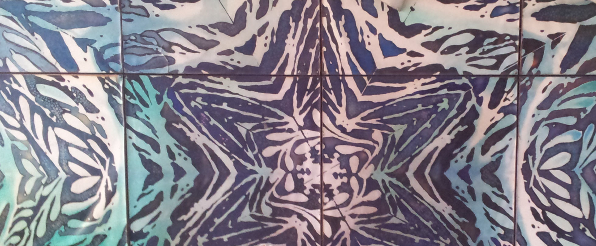 Wanddekor von Martin Freyerr in der Albert-Schweitzer-Schule (abgerissen), Hilden